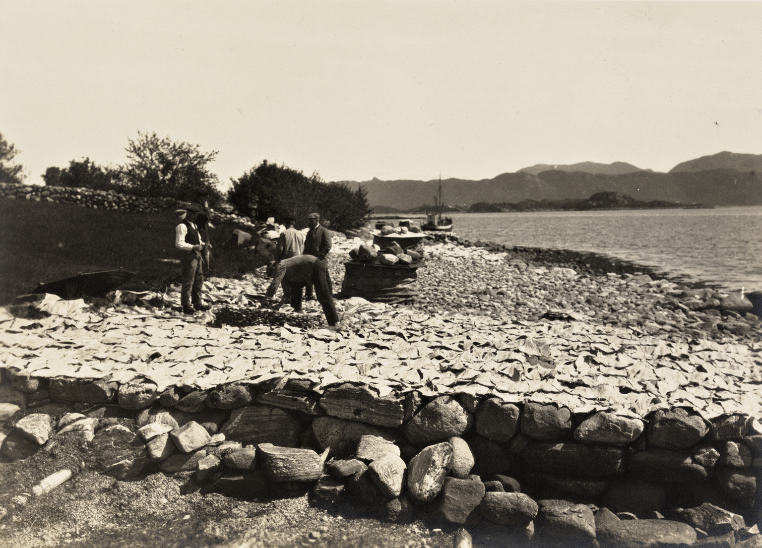 Tittel / Title: Klipfiskberg Motiv / Motif: Bildet står i albumet: "Stortingets Jernbanekomite's besøk i Aalesund 9-9-1920: Aalesund og Søndmøres næringsliv belyst ved tal og billeder". Drying of klippfisk (split, salted and dried cod). Dato / Date: september 1920 Fotograf / Photographer: ukjent / unknown Sted / Place: Møre og Romsdal, Ålesund Eier / Owner Institution: Nasjonalbiblioteket / National Library of Norway Lenke / Link: Bildesignatur / Image Number: bldsa_FAalb008_077